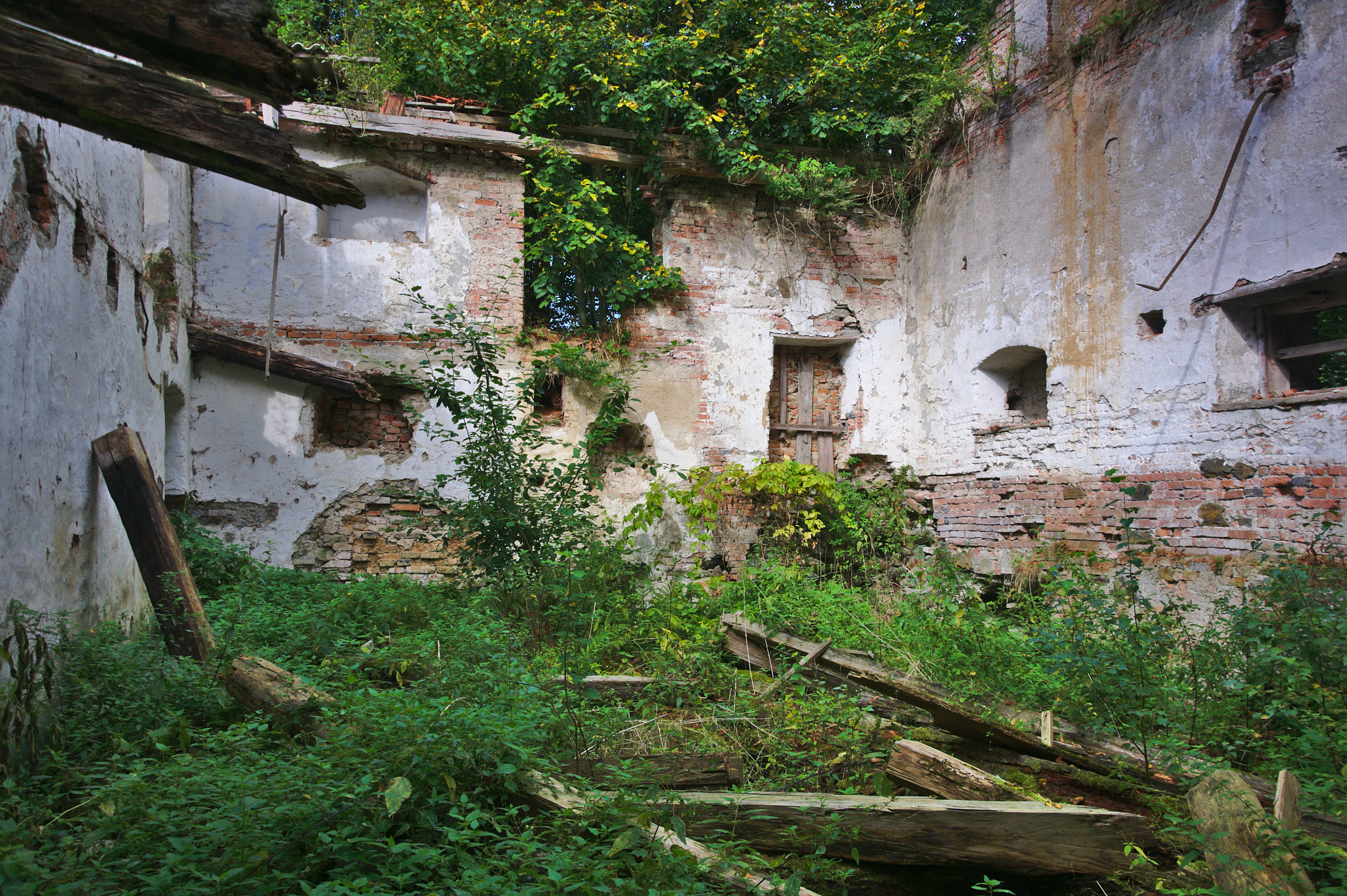 Hrázný mlýn, Čunín, Konice, okres Prostějov